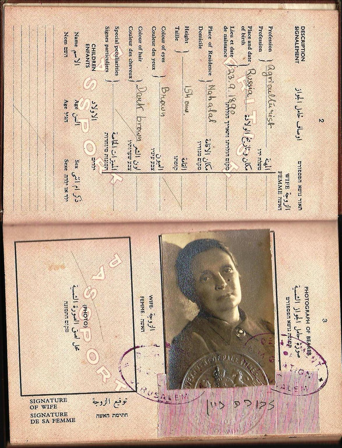 דרכונה המנדטורי של גברת דבורה דיין, אימו של משה דיין.